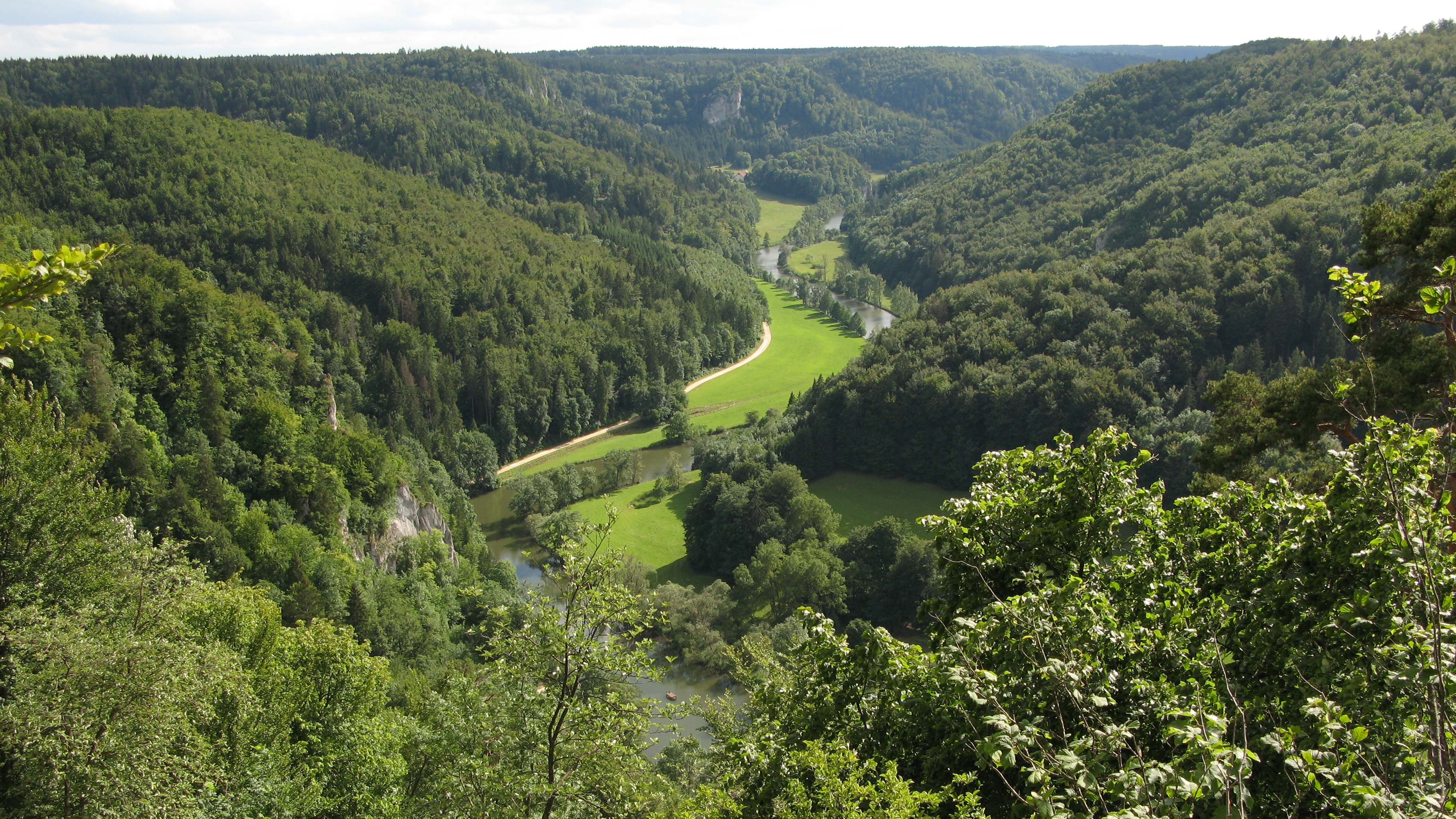 Die Donau im Donaudurchbruch zwischen Fridingen und dem Jägerhaus bei Schloss Bronnen am Donauberglandweg auf der Schwäbischen Alb.